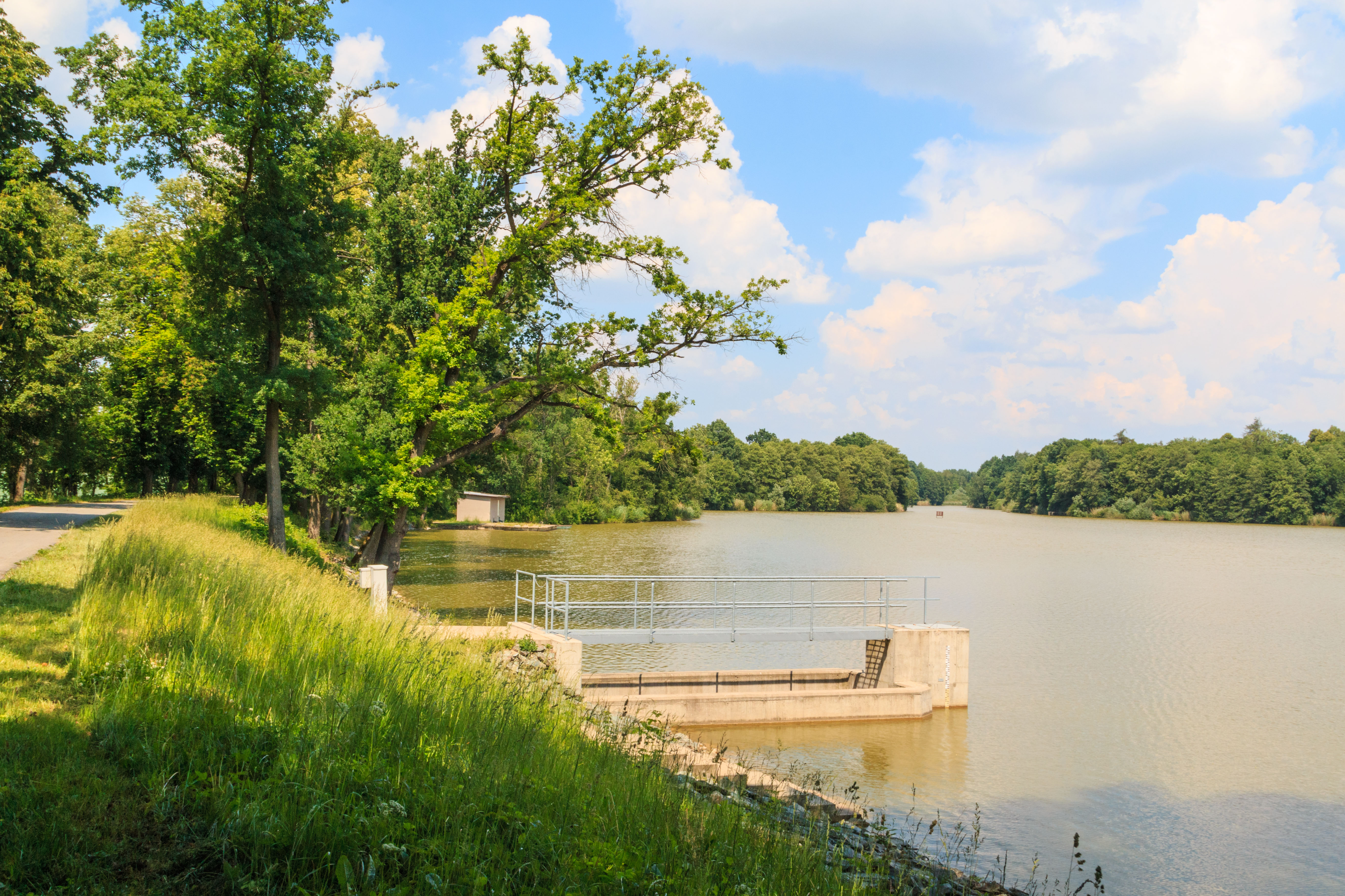 Černíkovický rybník